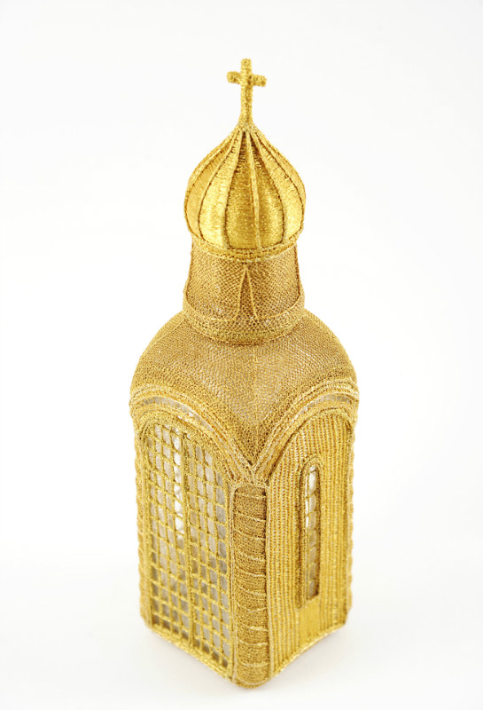 "Часовня" Кружево, выполненное крючком на стекле, нитки металлик. Патент РФ № 2093625 на изобретение «Способ вязания».